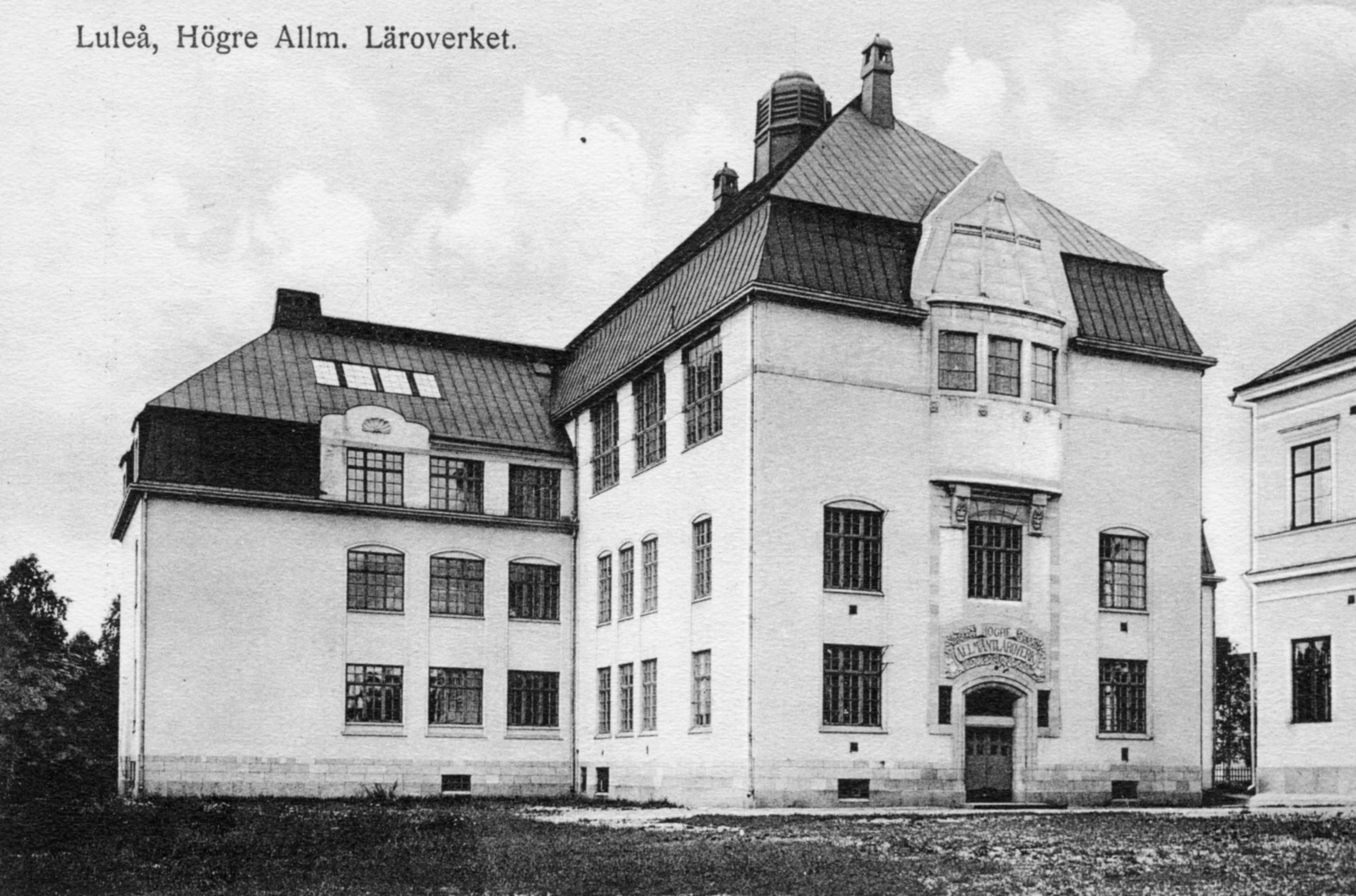 Luleå Högre Allmänna Läroverk. Tryckt på vykortet: "Luleå, Högre Allm. Läroverket. A-B Göteborgs Konstförlag."